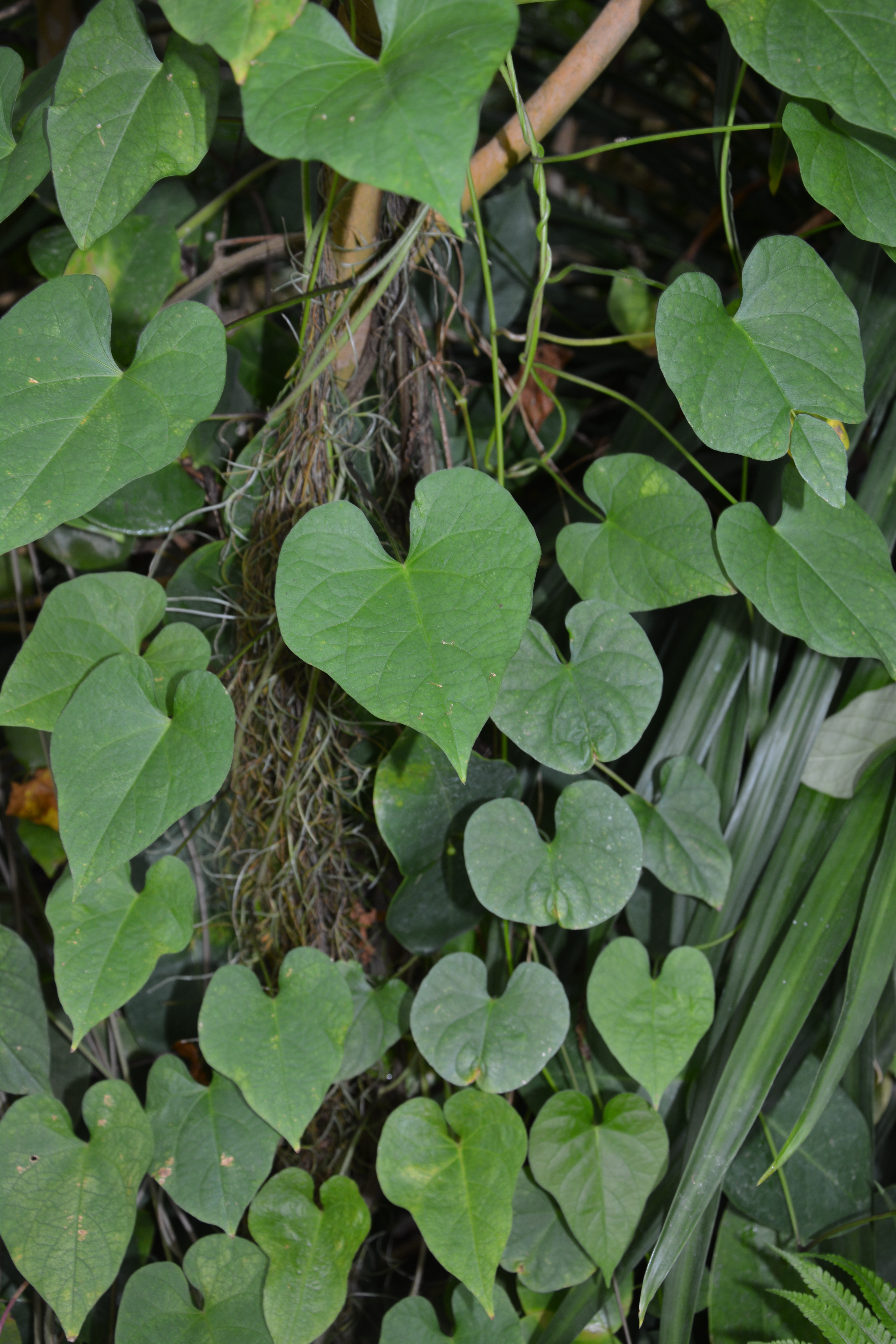 Ipomoea walpersiana, photo prise au Conservatoire national de botanique de Brest à l'occasion du "Wiki takes Conservatoire Botanique National de Brest"